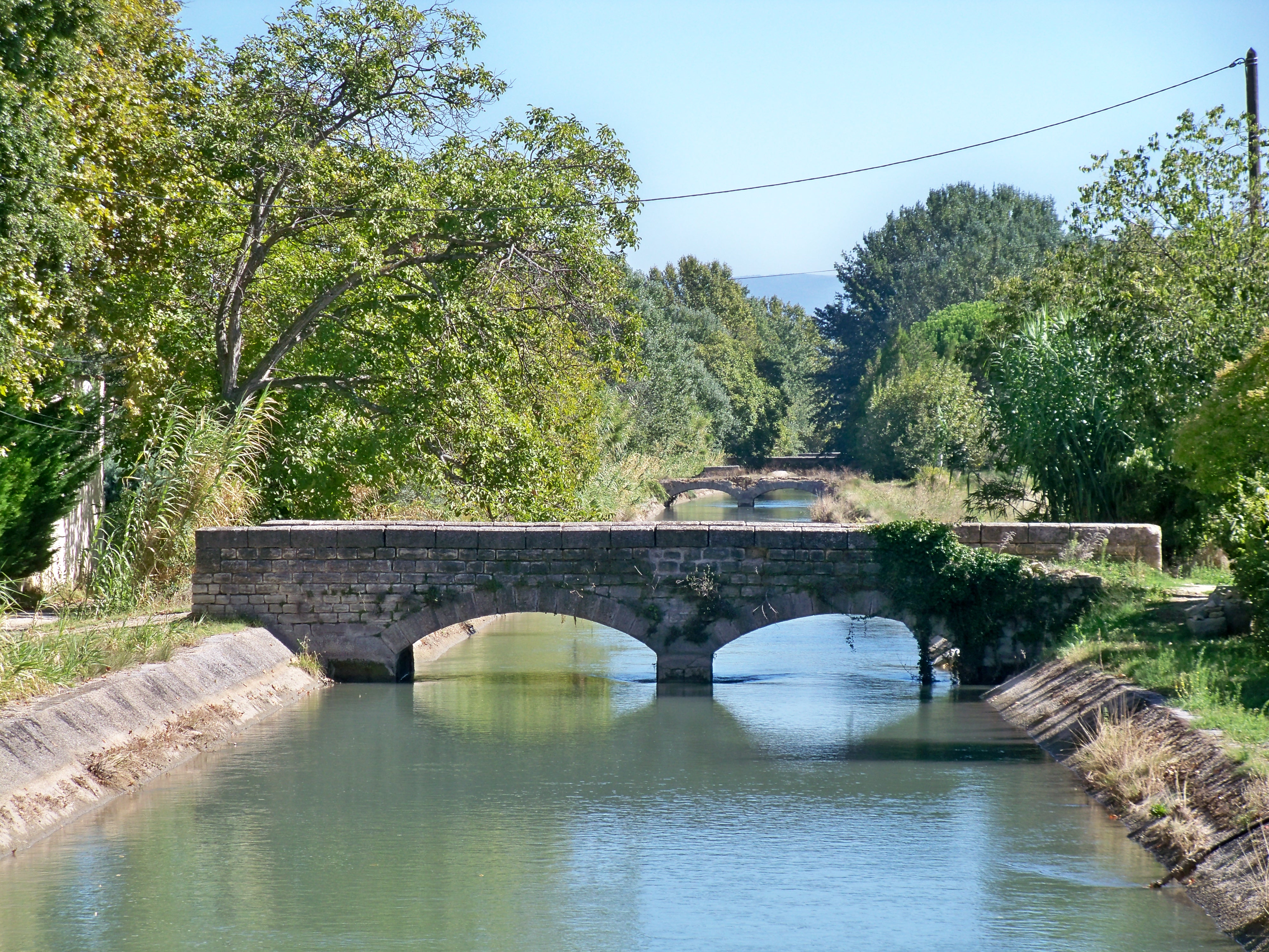 ancien pont sur canal à Robion (Vaucluse, France)